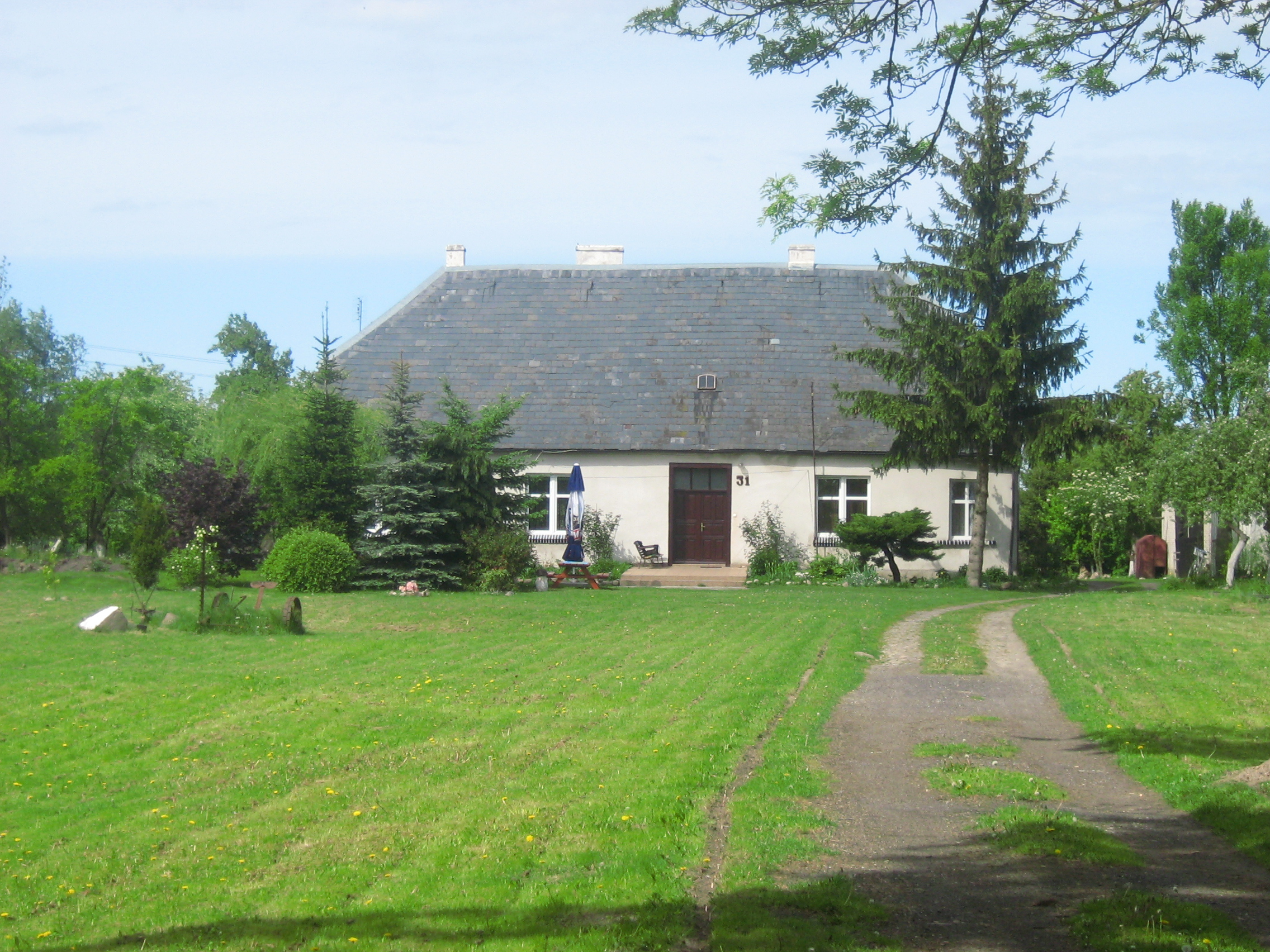 Zabytkowy dom z numerem 31